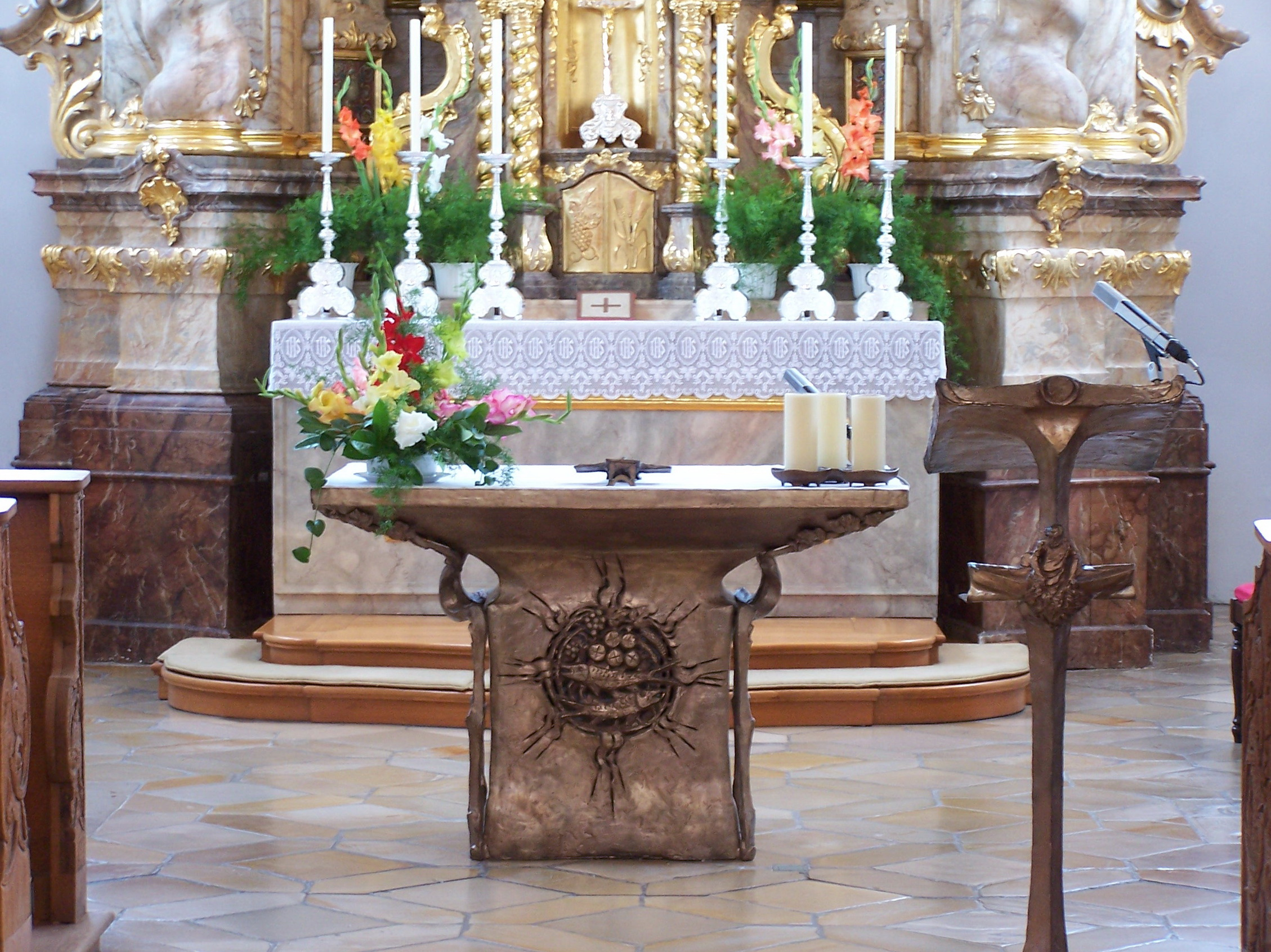 Sandsbach, Am Kirchberg 3; Am Kirchberg 2. Katholische Pfarrkirche St. Petrus. Der Volksaltar wurde 1986 eingweiht. Das Relief mit fünf Broten und zwei Fischen erinnert an die Brotvermehrung.